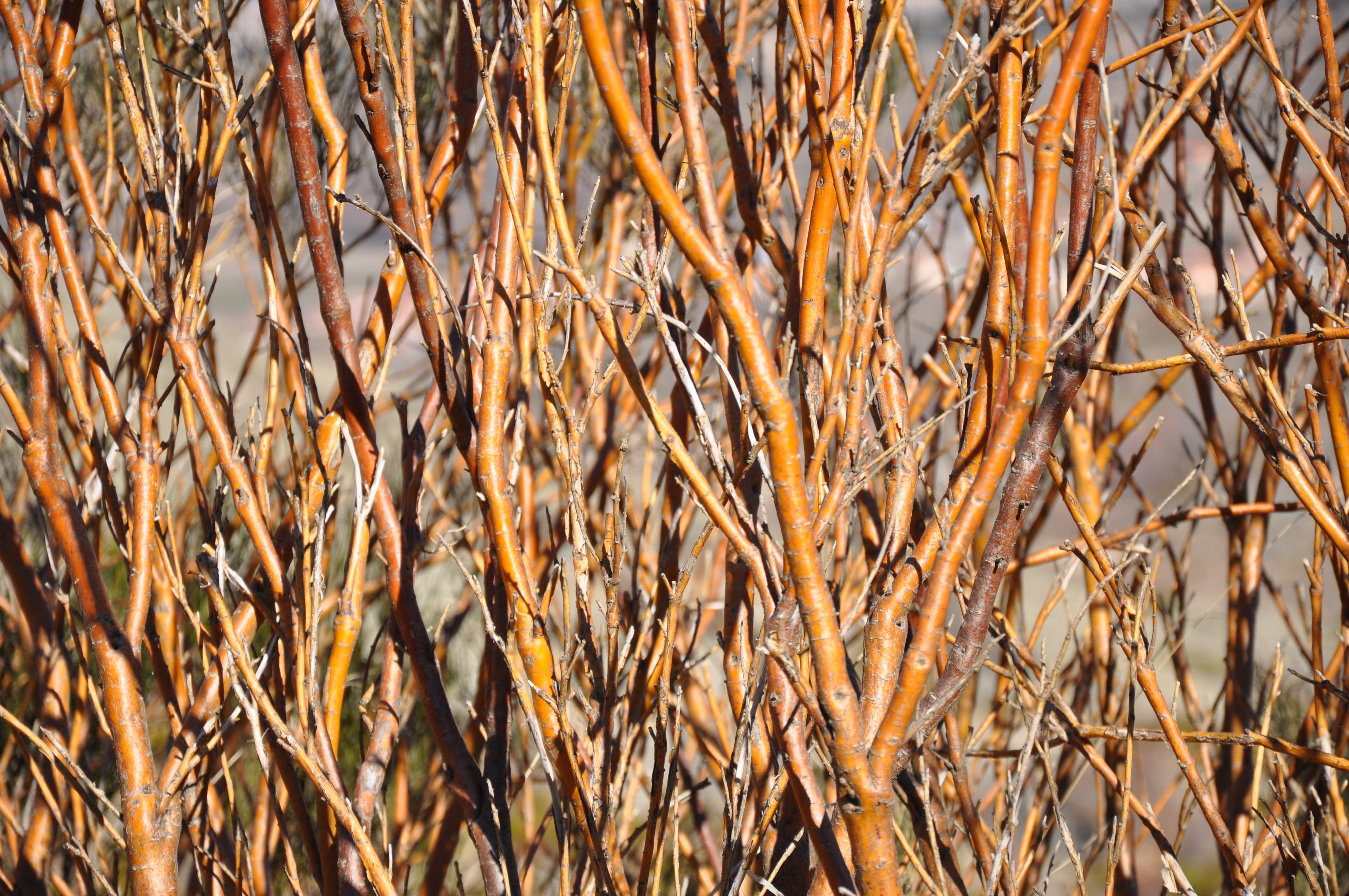 Ramas de hiniesta (Genista cinerascens) Villaviciosa ,AV, España.